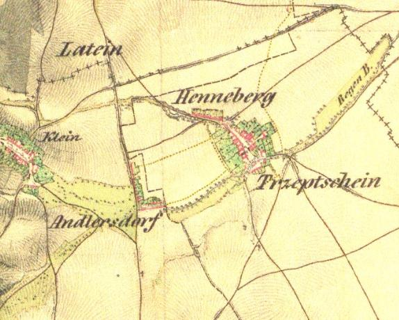 Stará mapa Líp (dř. Andlerka) a Třebčína, dnes okr. Olomouc